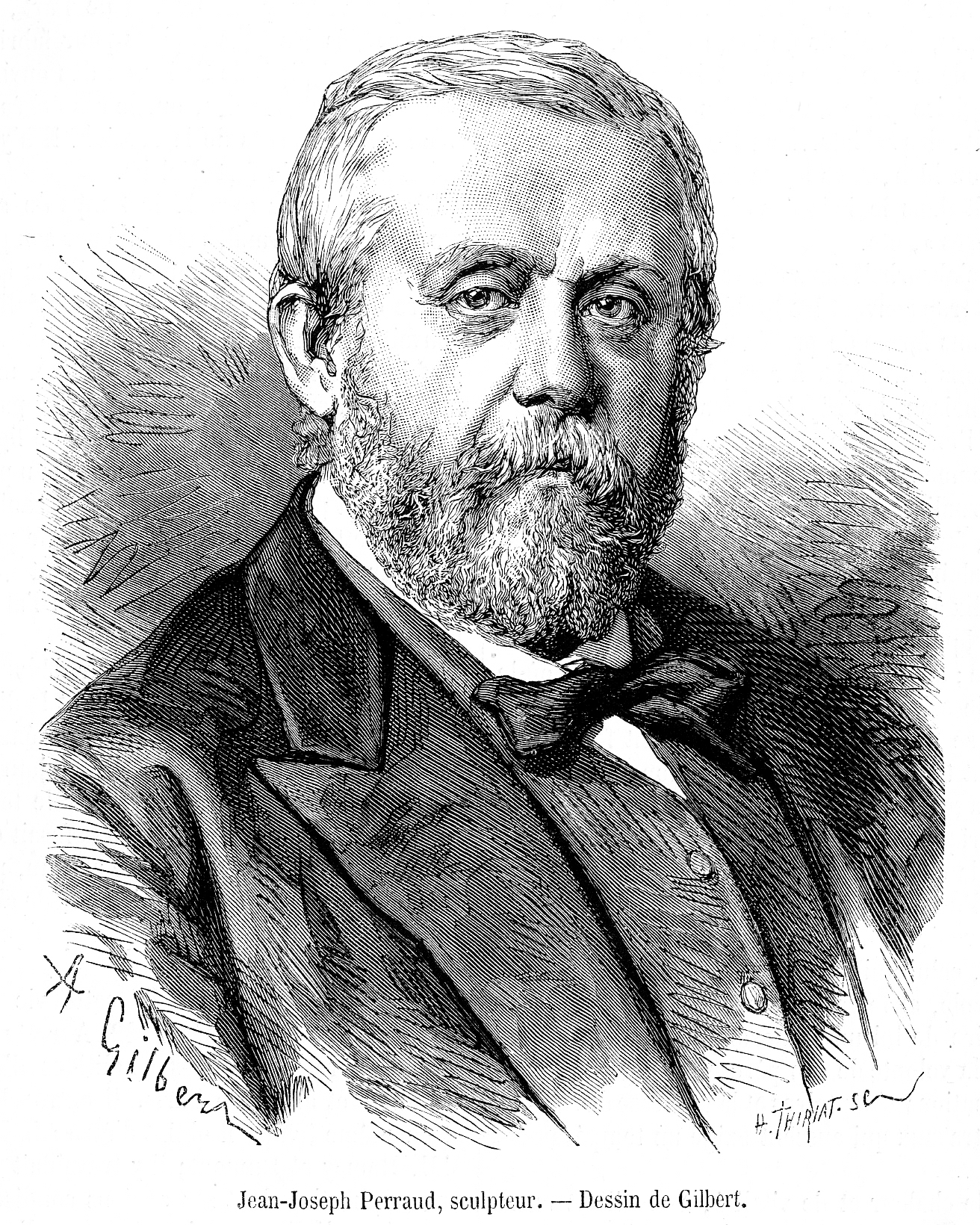 Jj_perraud.jpg